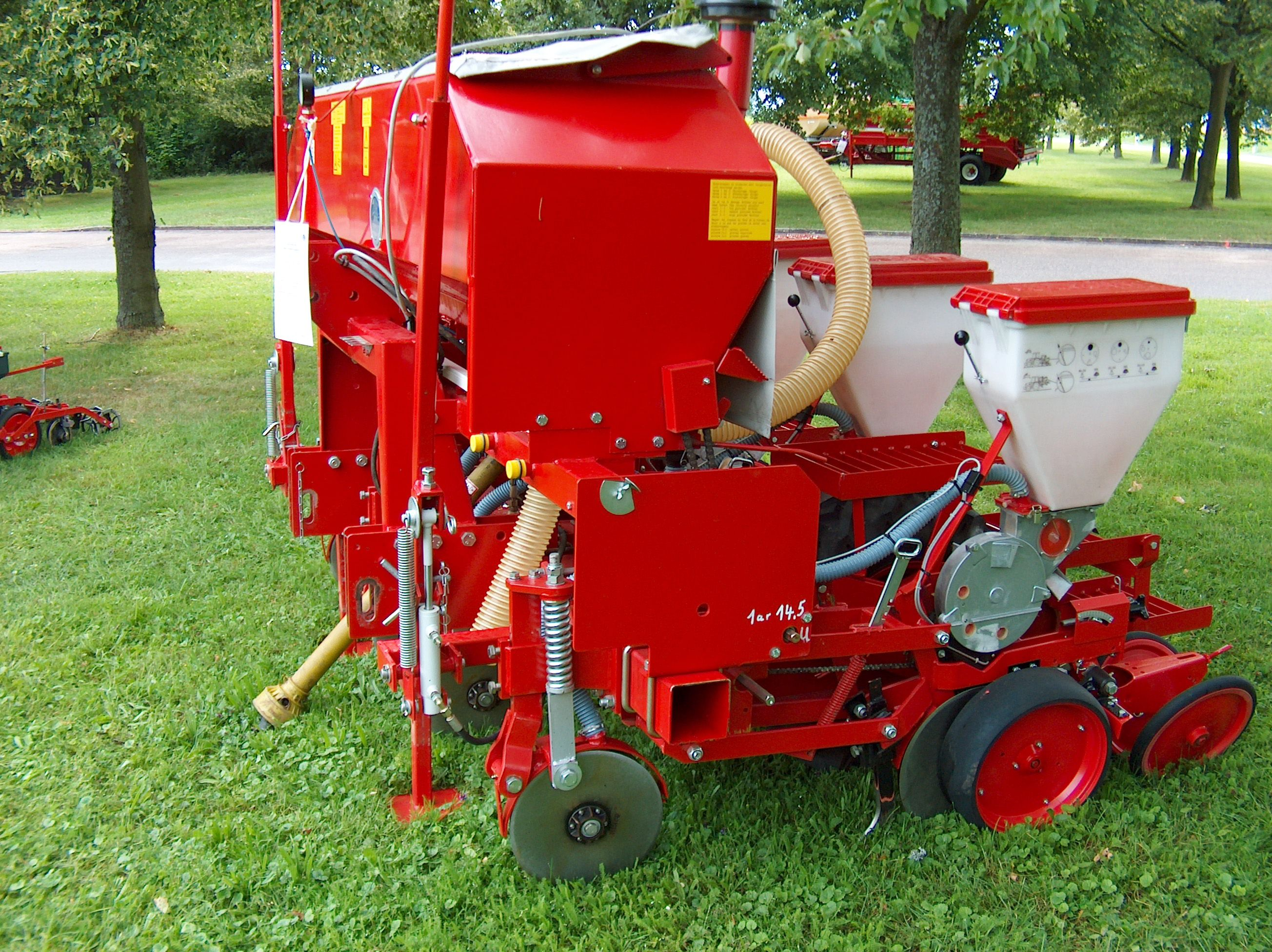 Pneumatisches Mais-Einzelkornsaatgerät Aeromat von Kongskilde